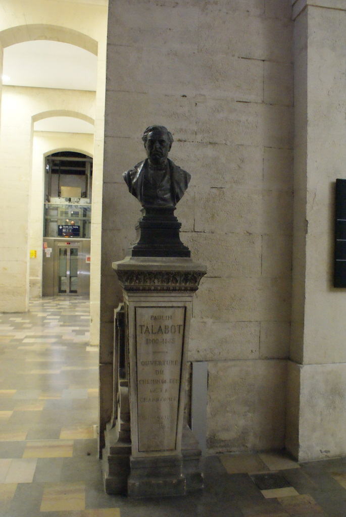 Buste de Paulin Talabot